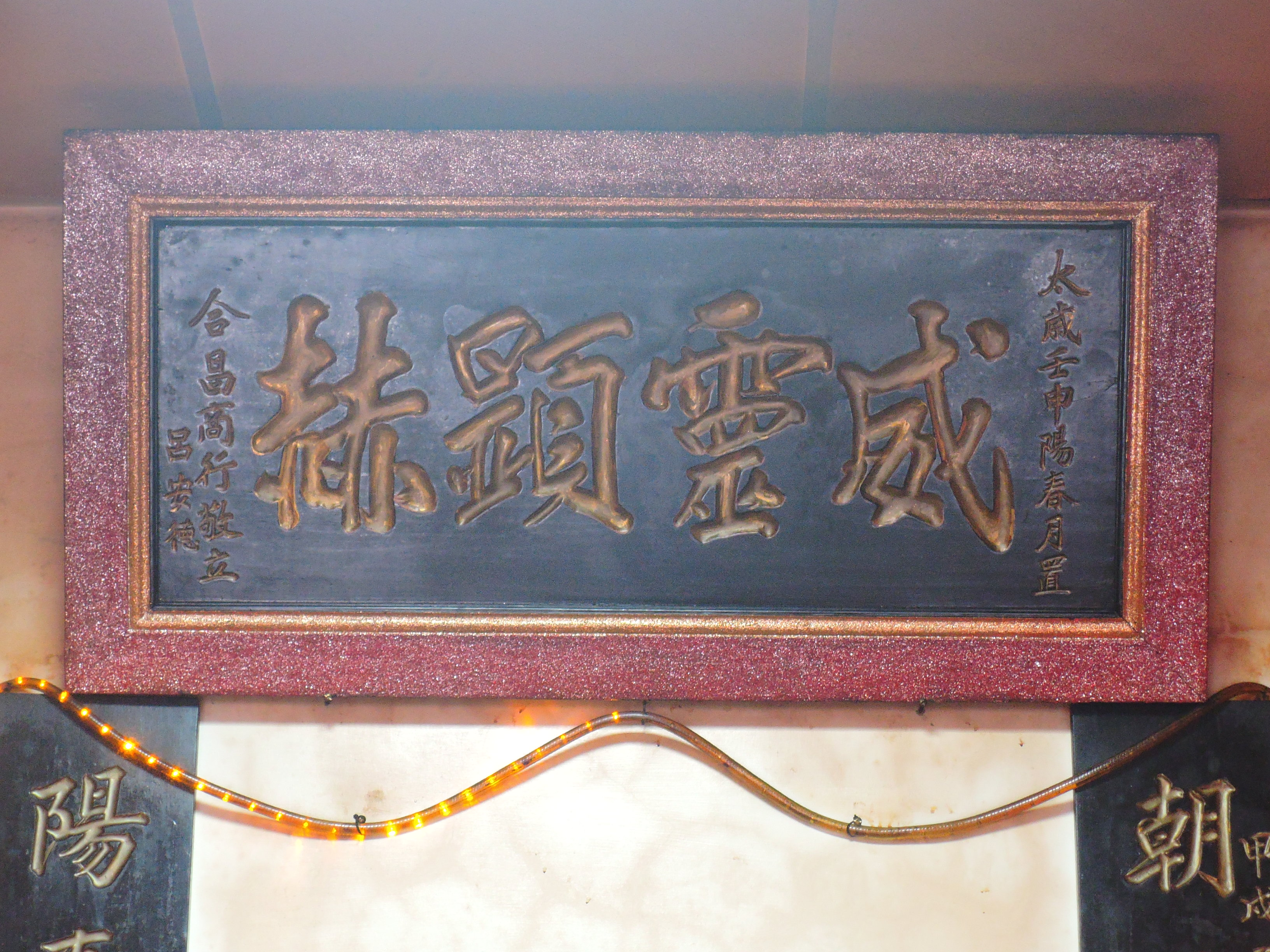 中文（台灣）: 朝陽祠威靈顯赫匾，合昌商行呂安德敬立。